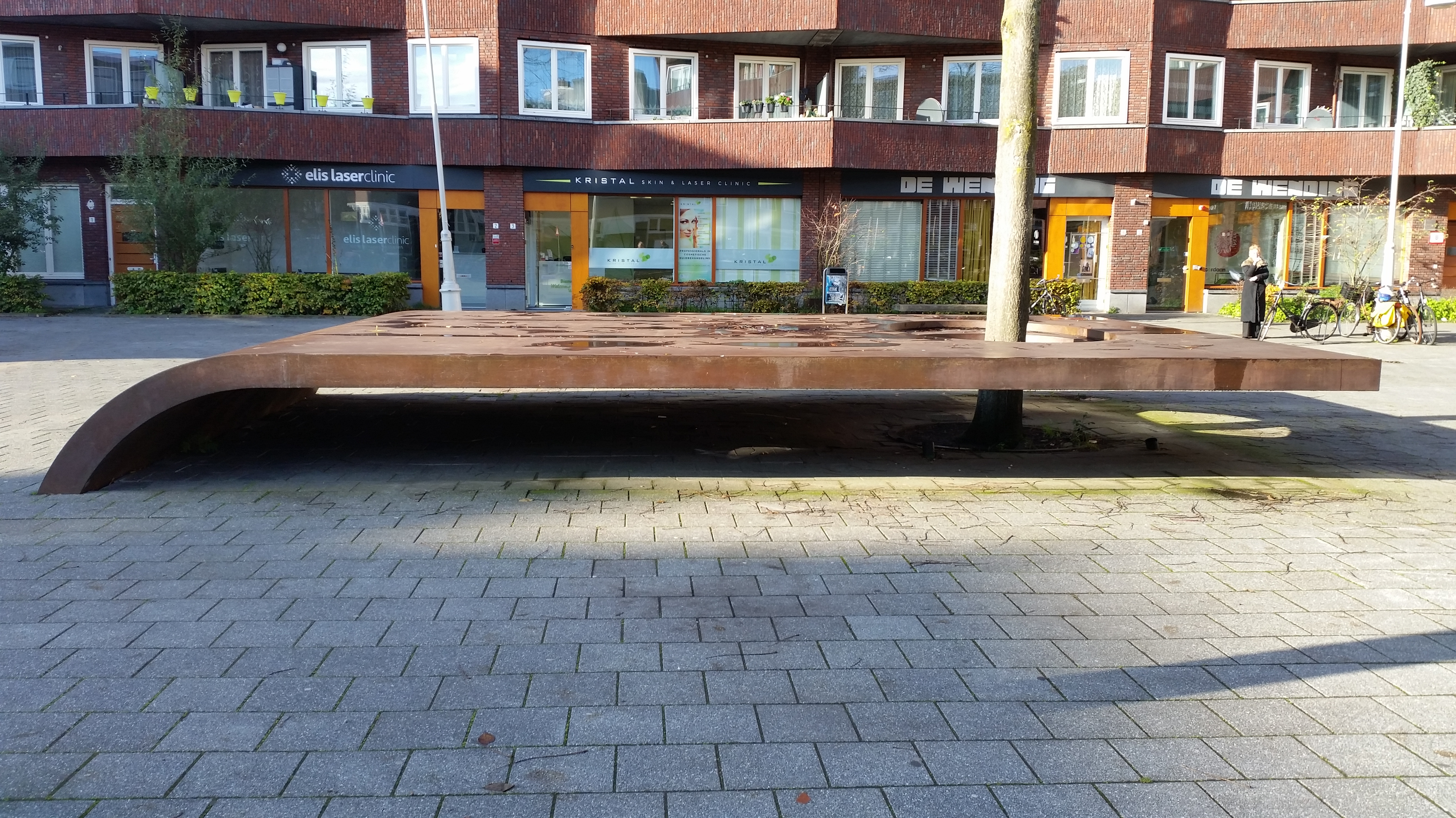 666/999 is een kunstwerk van Hans van Houwelingen en ondergang (666) en voorspoed (999), Amsterdam, Witte de Withplein